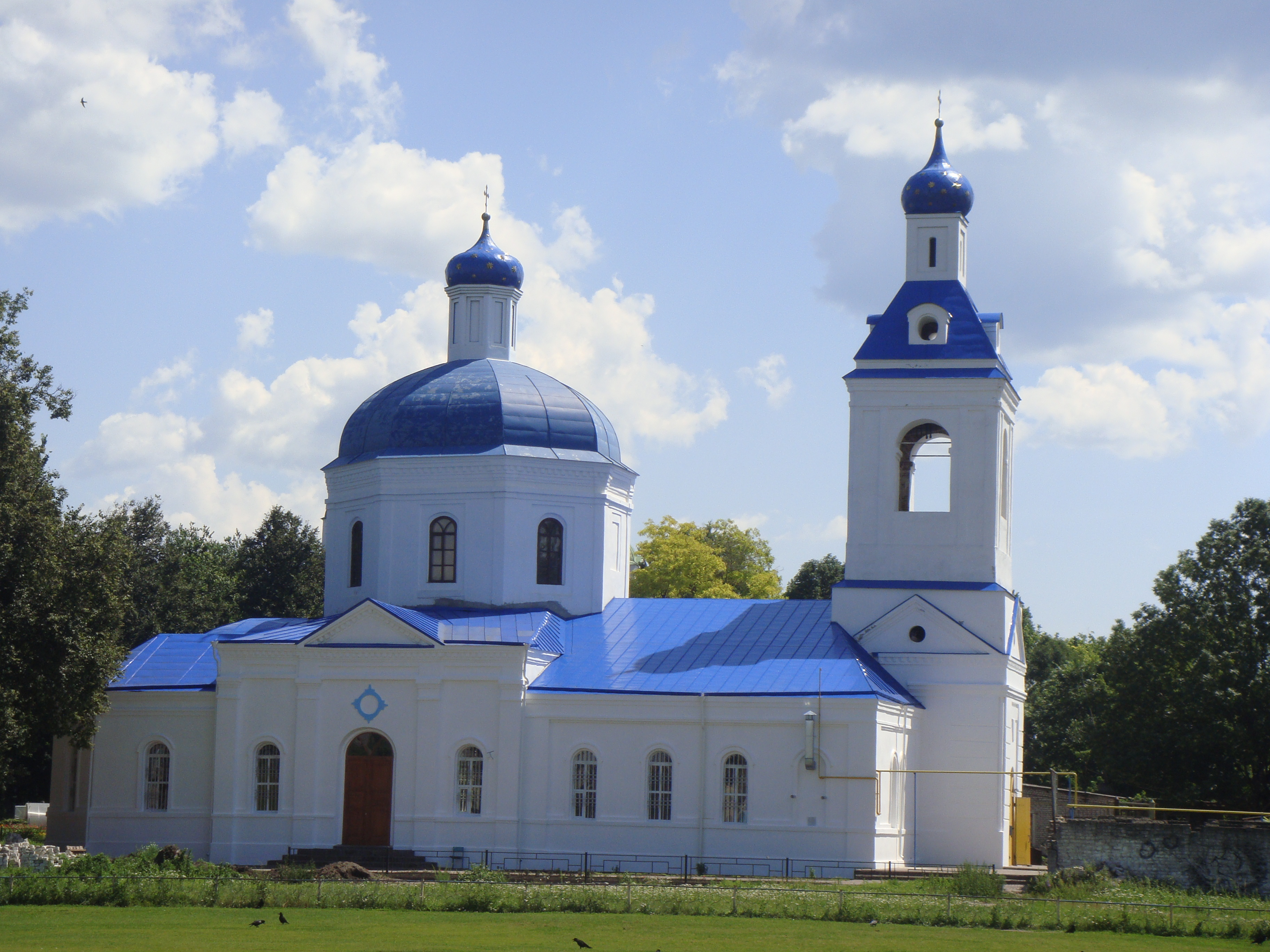 Собор Покровский (Брянская область, Трубчевск, городской парк)